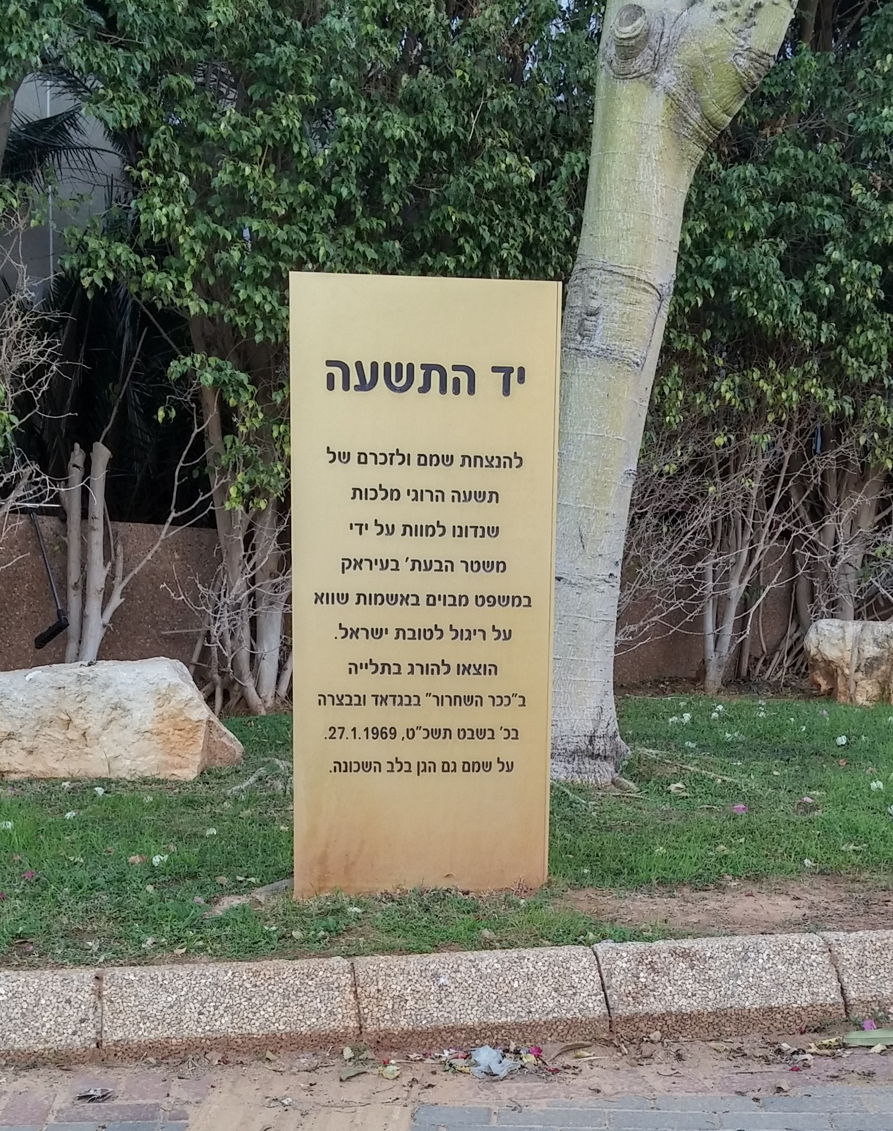 בכניסה לשכונת "יד התשעה" בהרצליה